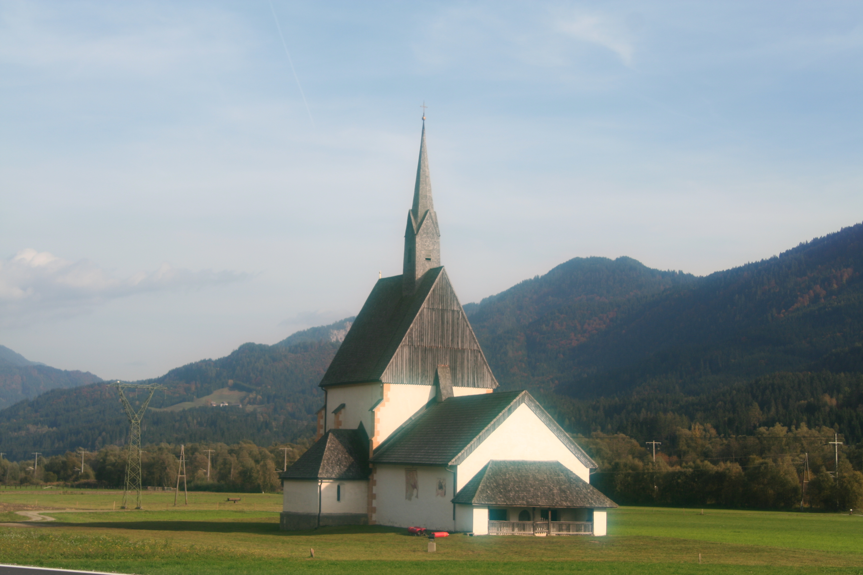 Filialkirche hl. Athanasius, Wallfahrtskirche bei Berg im Drautal, Kärnten, Österreich, EU.